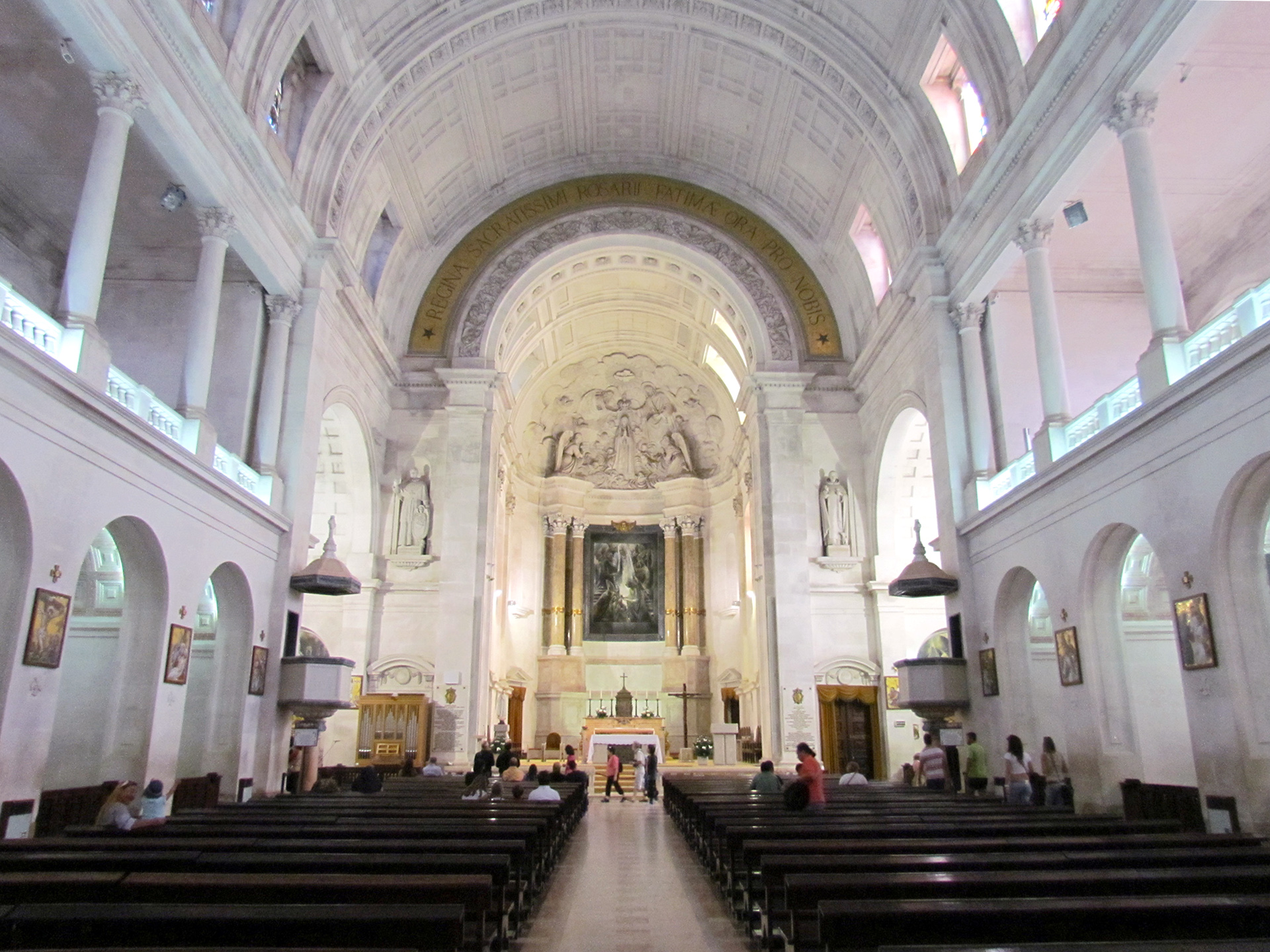 Santuário de Fátima